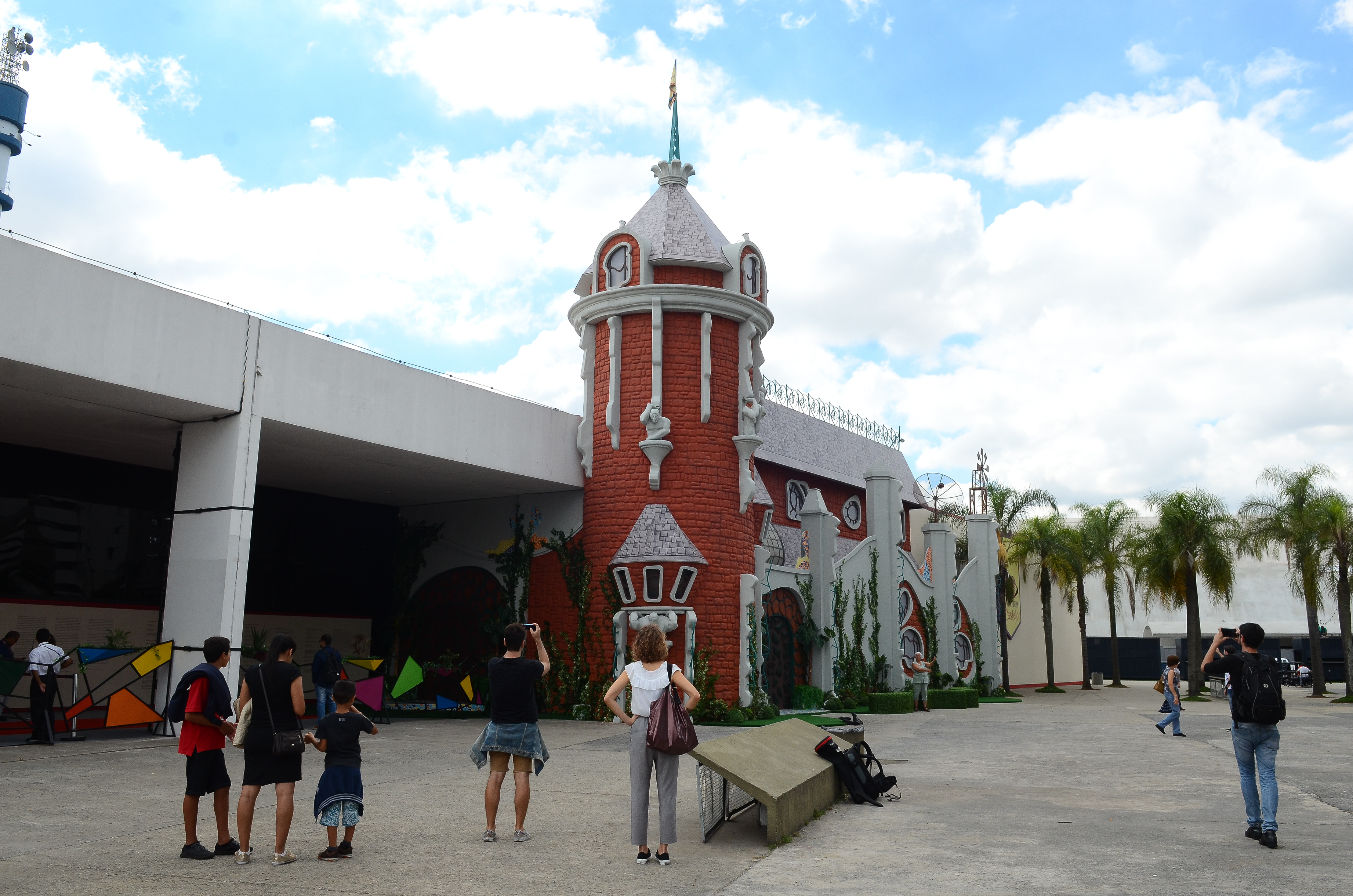 São Paulo - Memorial da América Latina, em parceria com o Governo do Estado de São Paulo, inaugura a exposição "Rá-Tim-Bum, o Castelo", que recria os cenários do seriado produzido pela TV Cultura na década de 90 (Rovena Rosa/Agência Brasil)